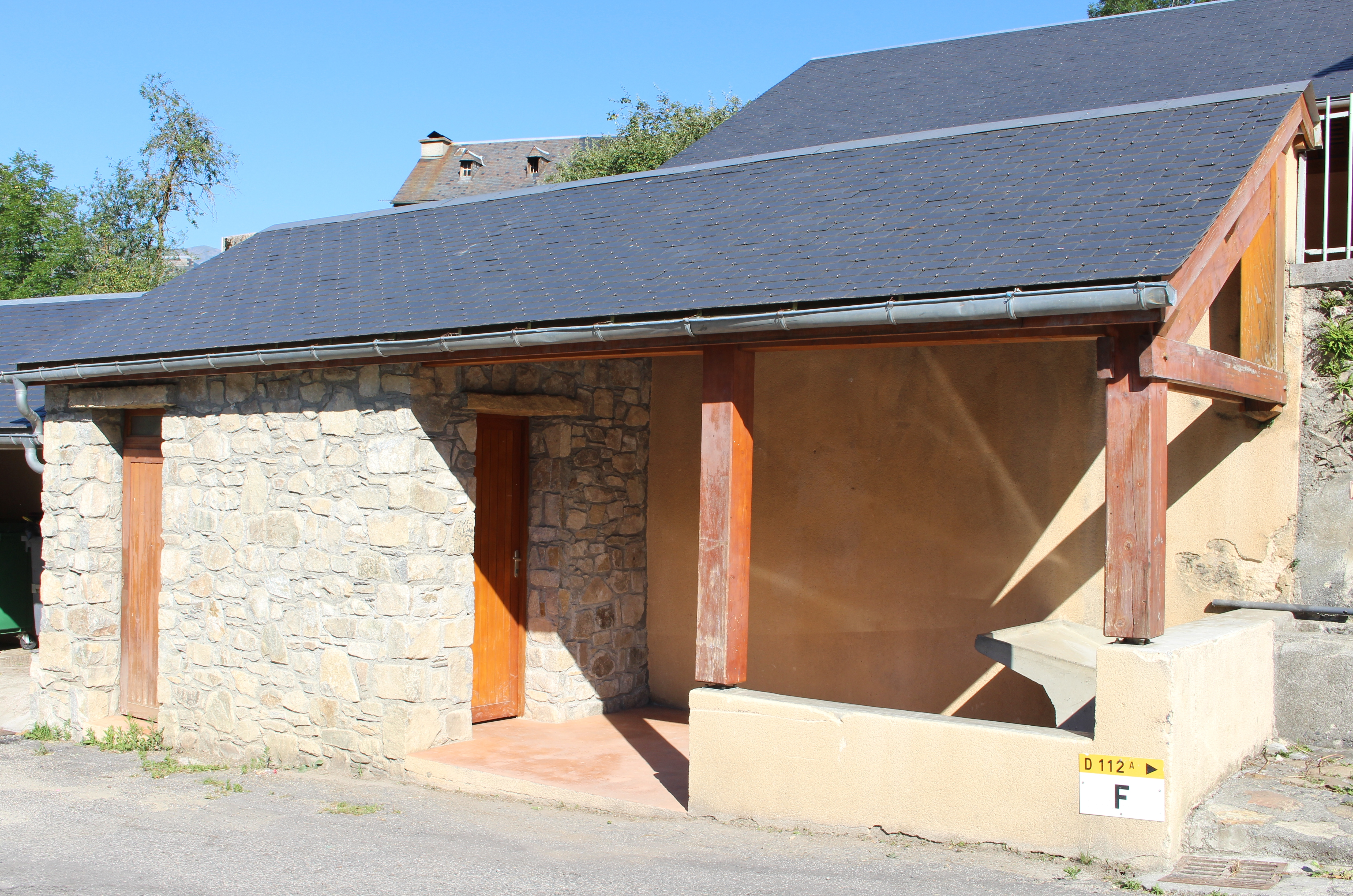 Lavoir de Jézeau (Hautes-Pyrénées)